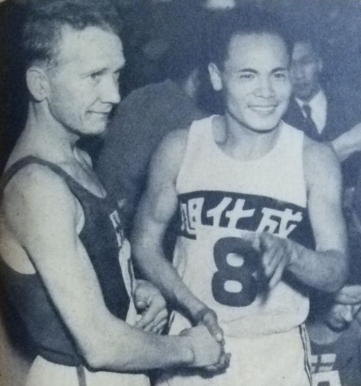 ヴェイッコ・カルボネンと廣島庫夫（第9回朝日国際マラソンにて）